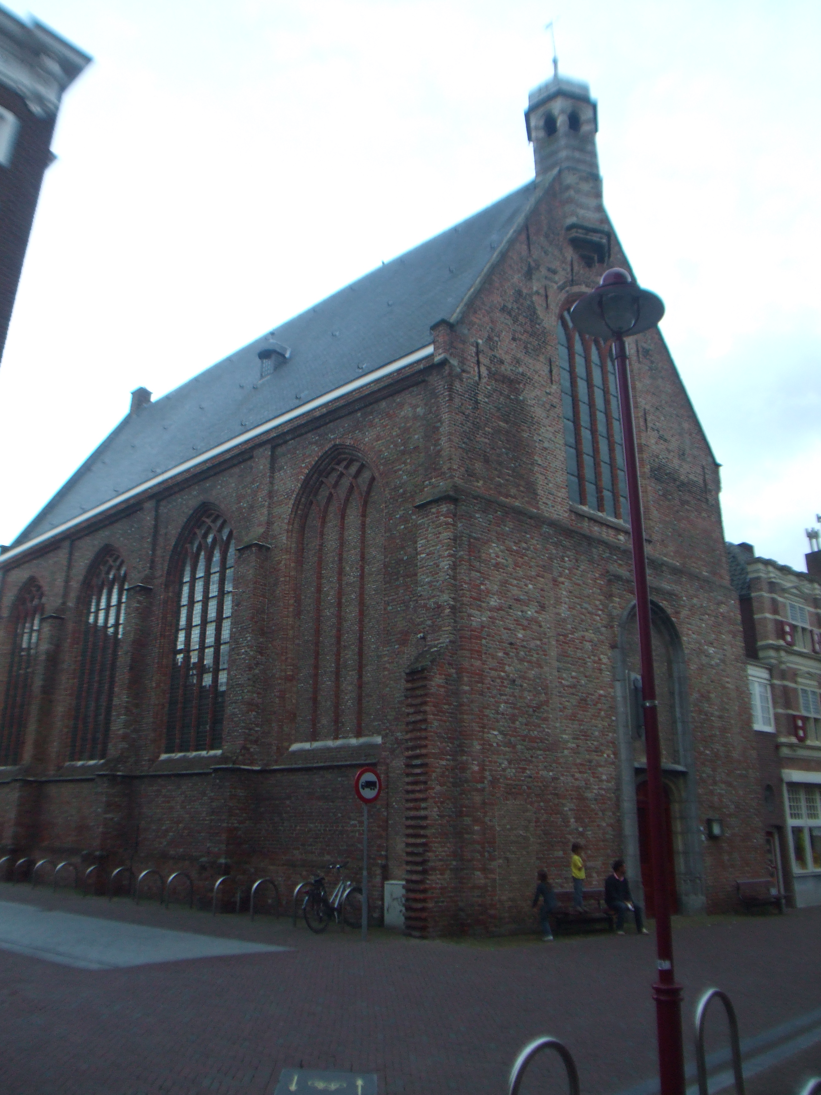 „Gasthuiskerk“ in Middelburg. Frühere rk. Hospitalkapelle (Gasthuis = Krankenhaus) von 1493/94. Nach verschiedenen Besitzerwechseln heute christlich-reformierte Kirche. 1961 wurden die benachbarten Altbauten abgebrochen.